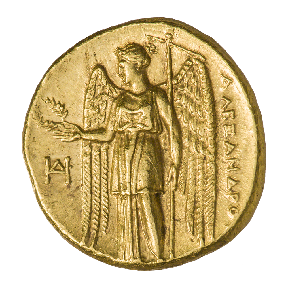 Македонское царство. Милет. Александр III Великий (336—323 гг. до н.э.). Статер. Чеканка при Филоксене (325—323 гг. до н.э.). Реверс. Ника стоит, влево; в правой руке держит венок, в левой — стилус. Слева монограмма. Справа надпись ΑLEΞΝΔΡΟΥ.